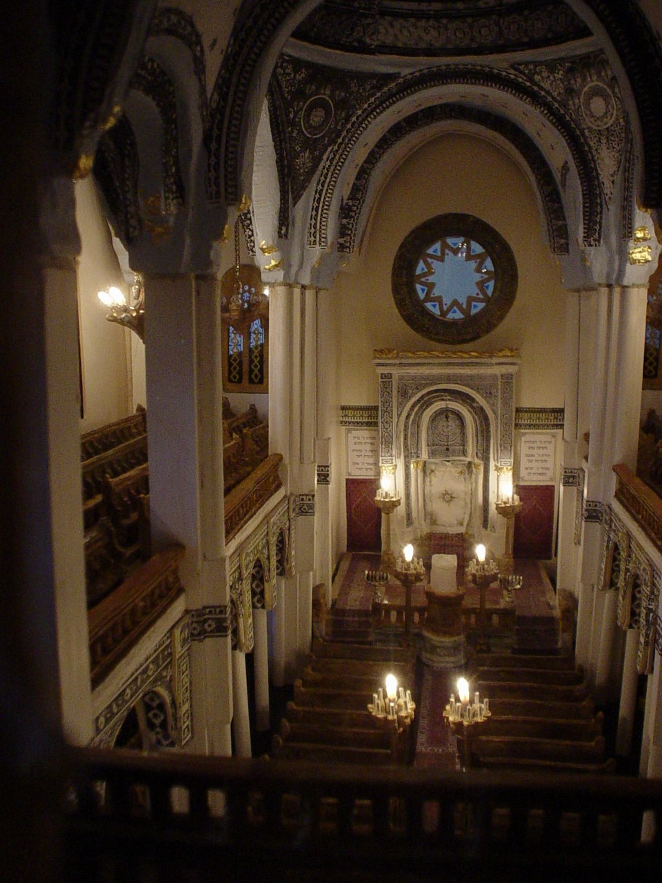 Das Modell der in Jahr 1938 zerstörten Nürnberger Hauptsynagoge am Hans-Sachs-Platz . befindet sich in der Eingangshalle IKG Nürnberg (cm:95x59x98)